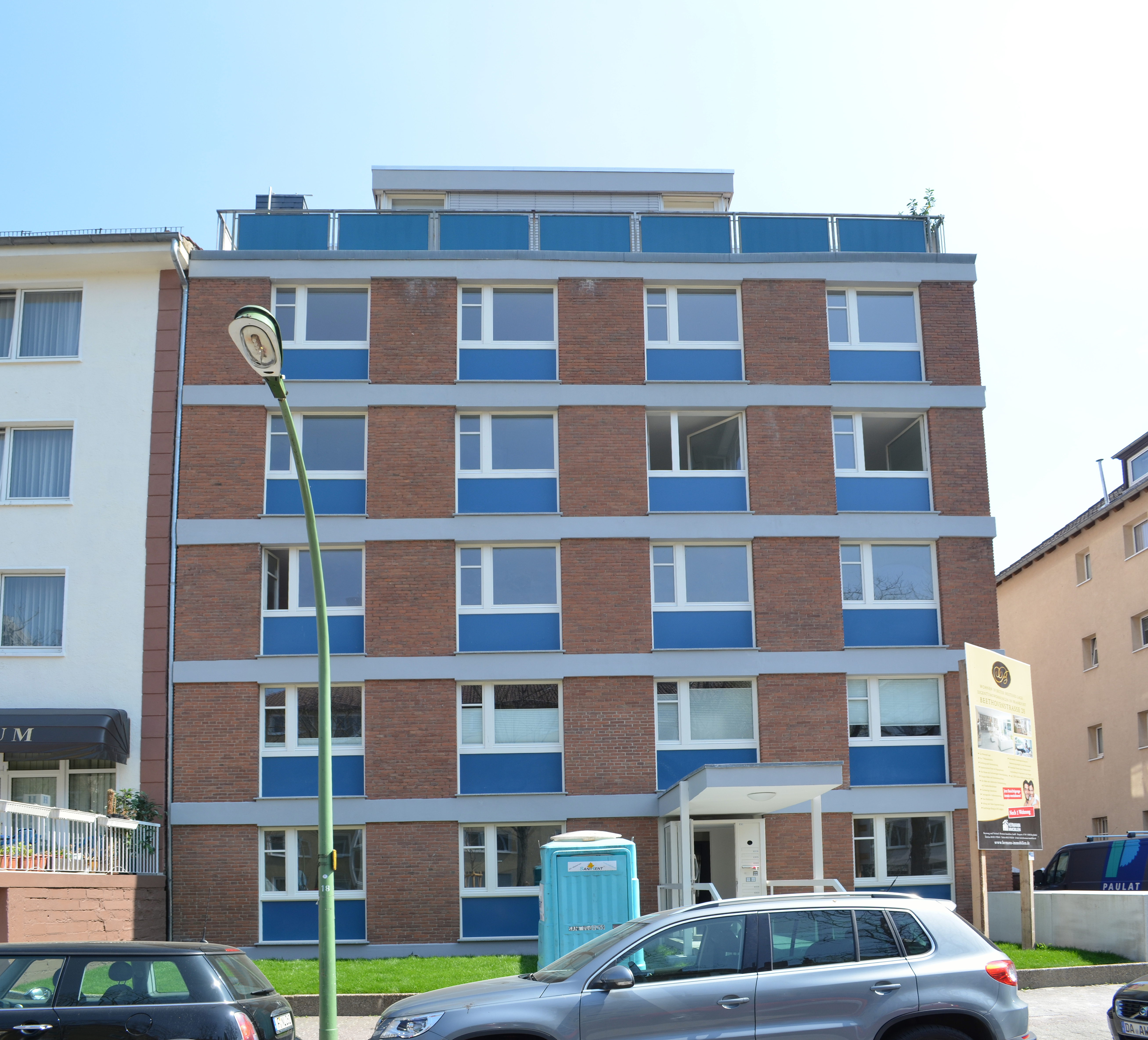 Frankfurt, Beethovenstraße 28